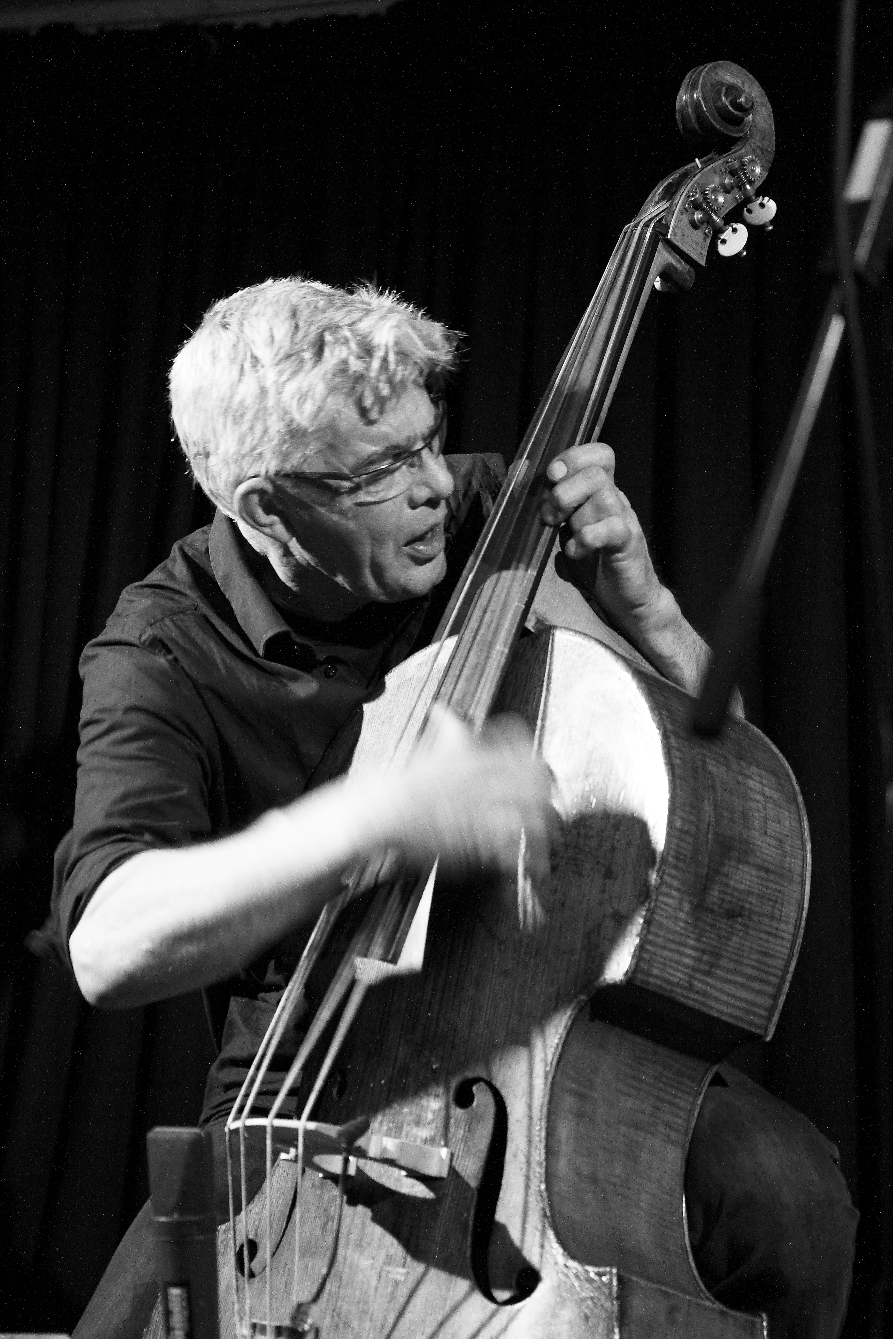 Das Trio mit John Butcher (sax), Wilbert de Joode (db) und Martin Blume (dr) im Club W71, 2018. Eine Veranstaltung in Zusammenarbeit des Club W71 mit dem SWR2 und Julia Neupert.